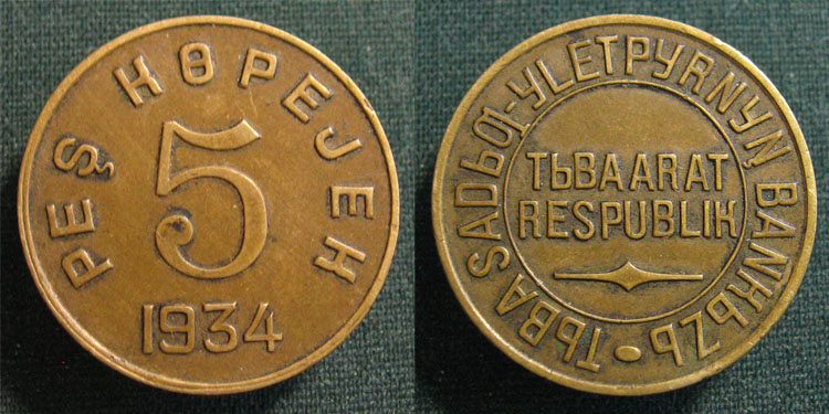 Монета Тувинской Народной Республики номиналом 5 копеекТыва дыл: ТАР-ның үезинде 5 көпеек, Демир акша